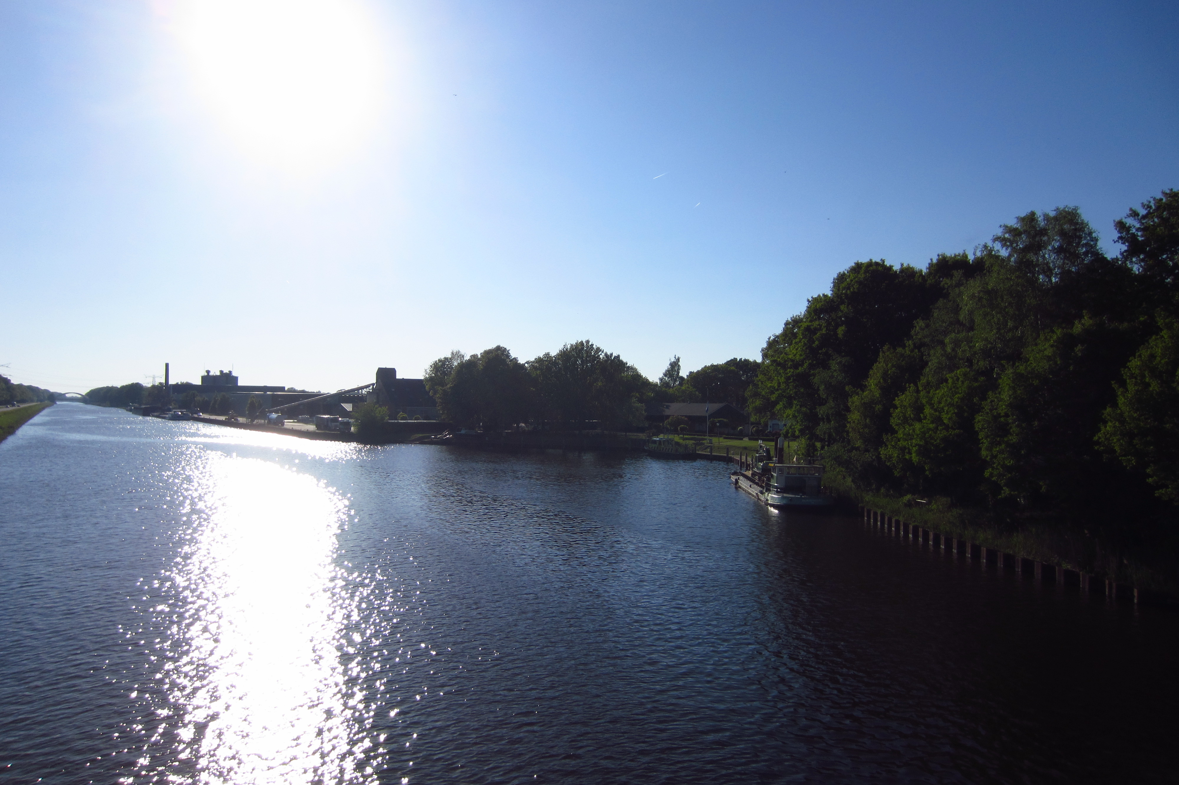 Twentekanaal, de haven van Goor, gezien richting zuid vanaf Hengelerbrug; verderop de Weldammerbrug.